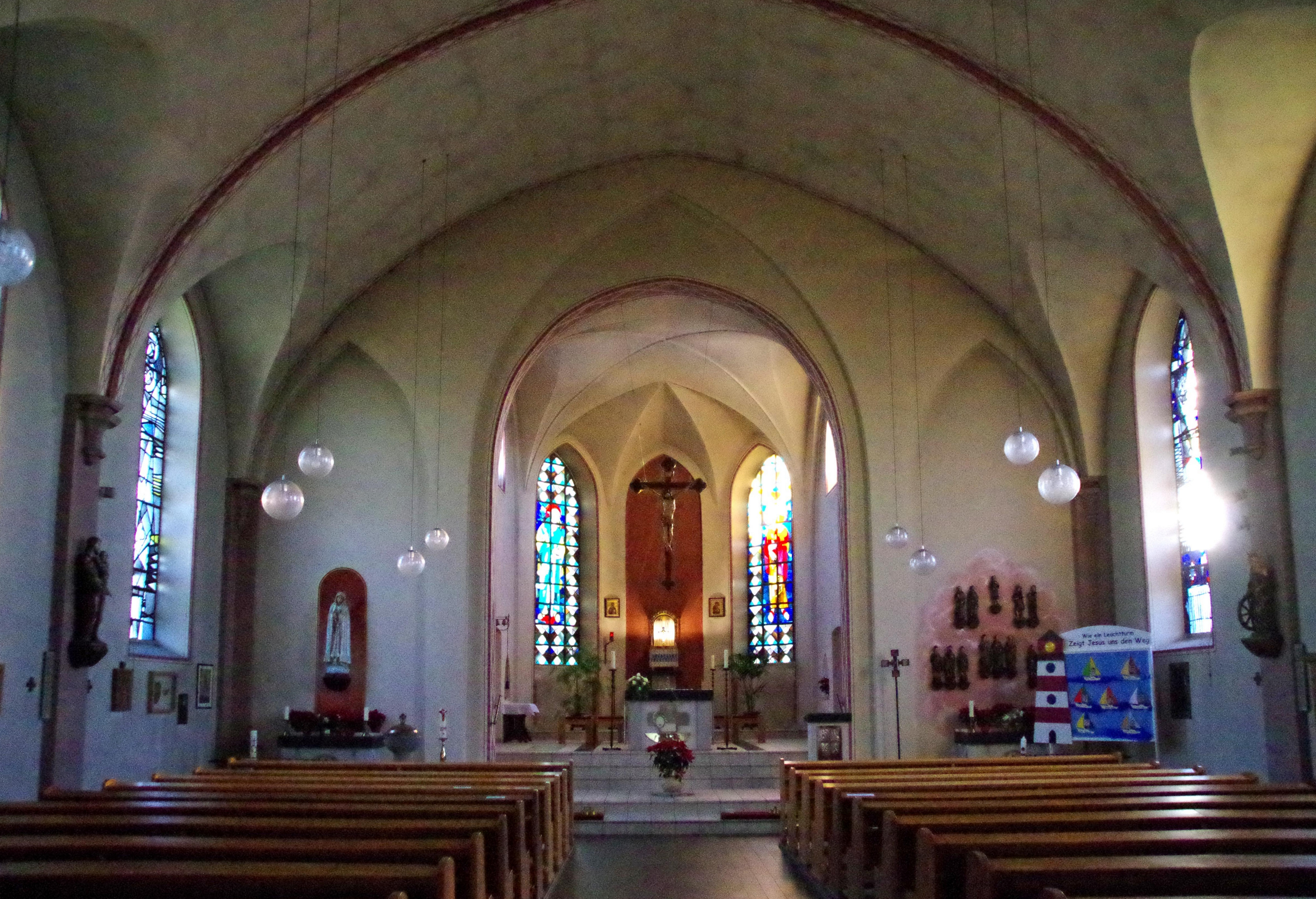 St. Peter und Paul (Kesternich), Kirchenschiff mit Blick zum Altar